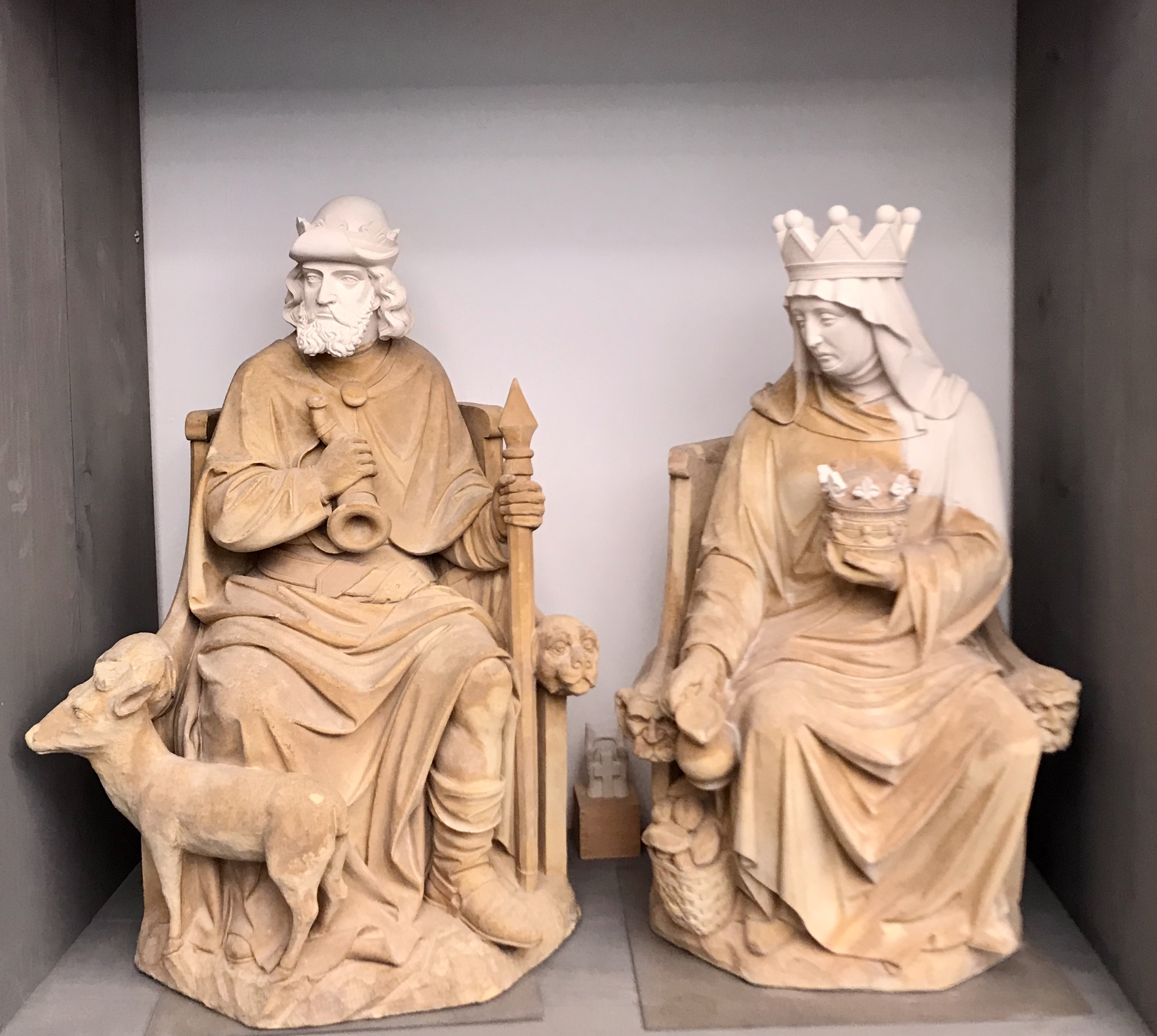 Dombauhütte Köln: Die von Peter Fuchs 1878-1881 geschaffenen Figuren des Michaelportal (Nordquerhausfassade) sind im Zweiten Weltkrieg stark beschädigt worden. 2013 hat die Dombauhütte eine eigene Steinrestaurierungswerkstatt eingerichtet und mit der Restaurierung der Figuren begonnen. Die Skulpturen wurden mit Laser gereinigt und nach den originalen Tonmodellen ergänzt. Die ergänzten Teile der Figuren sind weiß, der Originalbestand gelblich gefärbt. (Aufnahme der Skulpturen in der Steinrestaurierungswerkstatt).